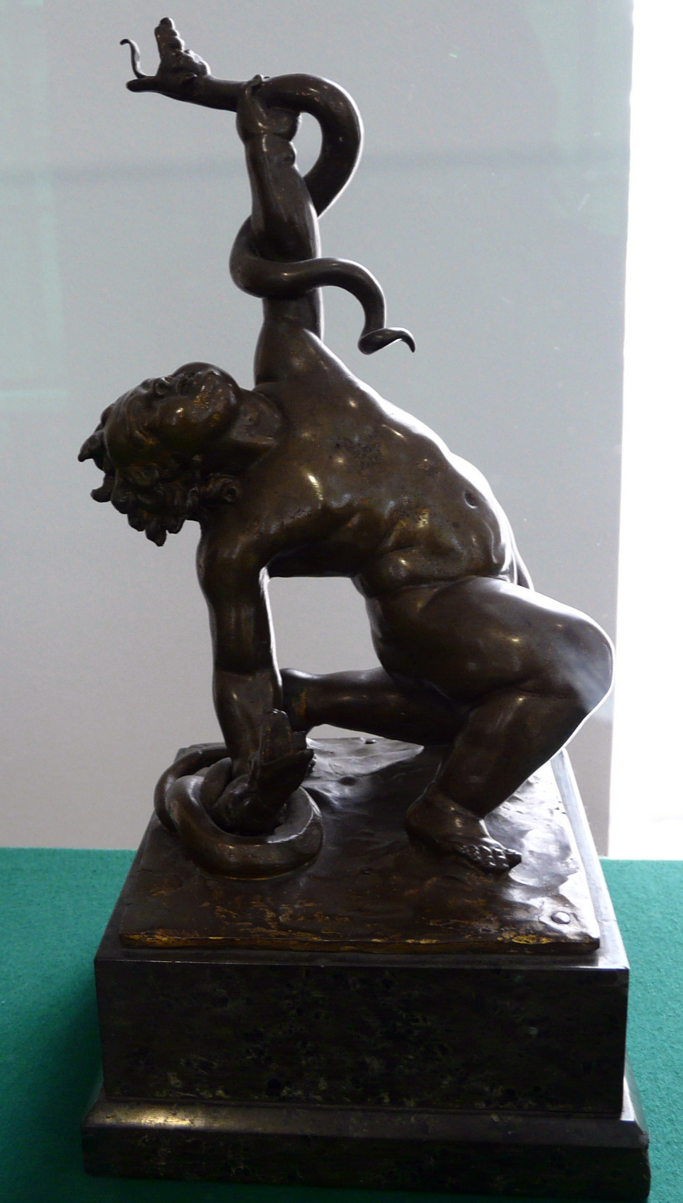 Francesco Fanelli (1608-1665) Hercules and the snakes (c. 1640) bronze Onderdeel van de collectie 'De bronzen'. Part of the collection 'The bronzes' of the Museum Boijmans van Beuningen, Rotterdam. Foto genomen op 21 juni 2009 tijdens Midzomer evenement voor WLANL georganiseerd door Museum Boijmans van Beuningen in Rotterdam.